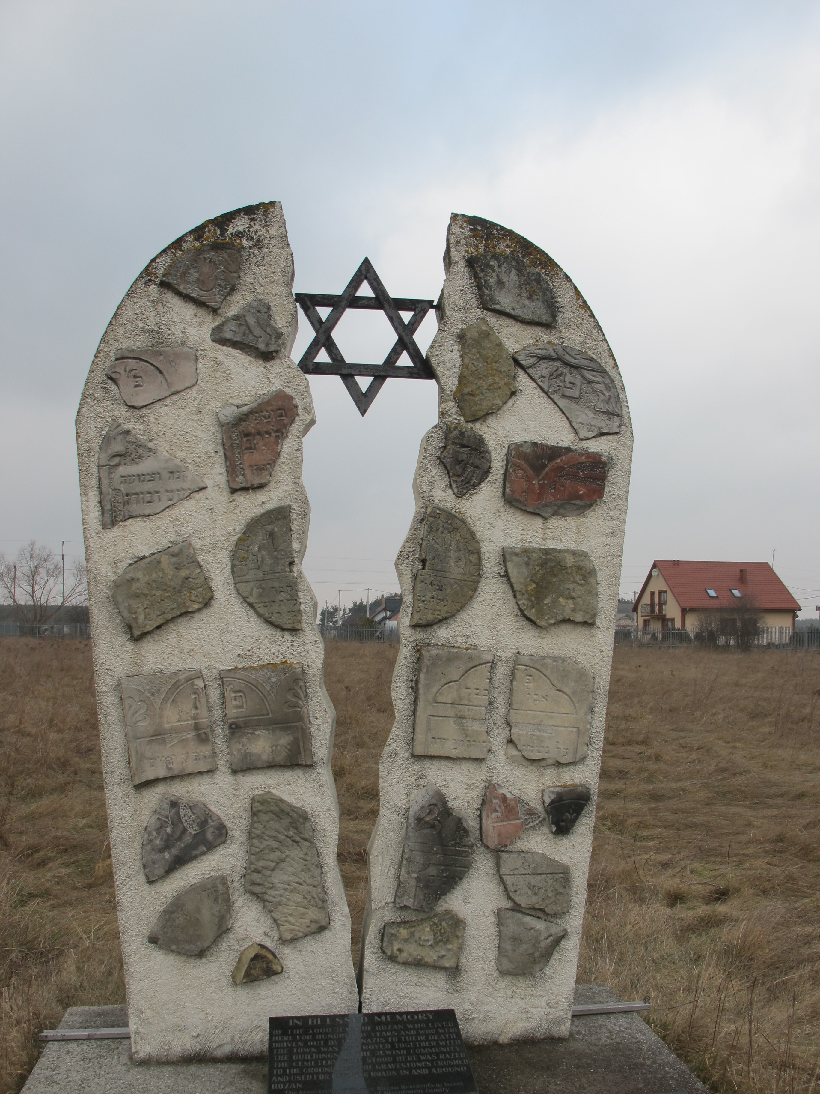 אנדרטת המצבות בבית העלמין ברוז'אן